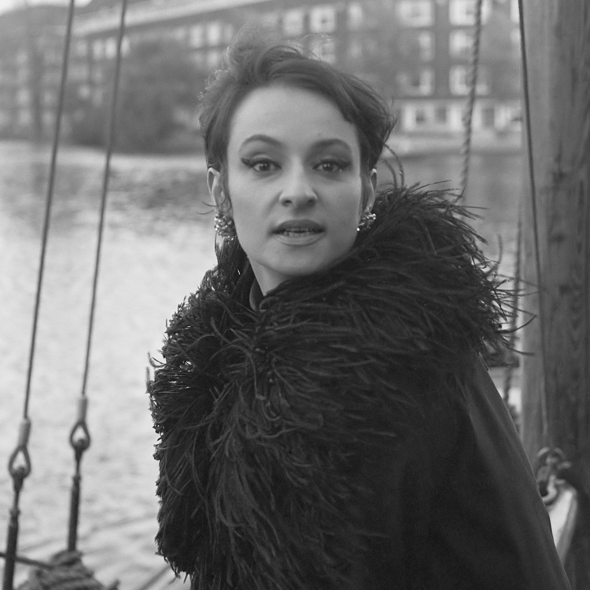 Franse chansonnière Barbara in Amsterdam 19 oktober 1965